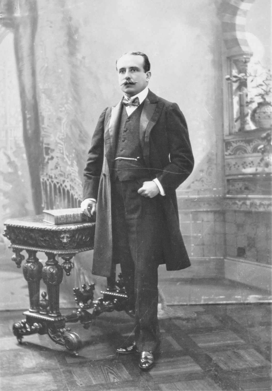 Nació en Lima en 1864. Abogado y Doctor en Ciencas Políticas y Administrativas por las Universidad Nacional Mayor de san Marcos. Asumió la Presidencia entre 1904-1908 y 1915-1919. Fue derrocado en 1919 por Augusto B. Leguia. Falleció en Lima en 1947.